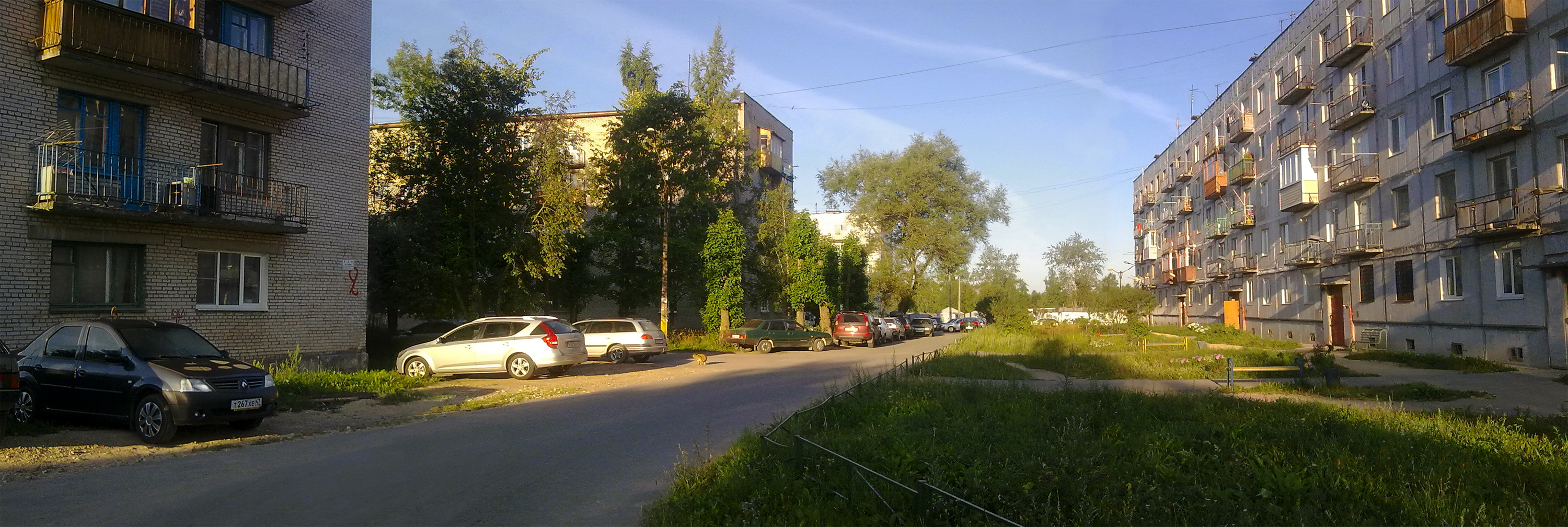 Панорама домов (№2,№1,№5,№6) на площади Усова.